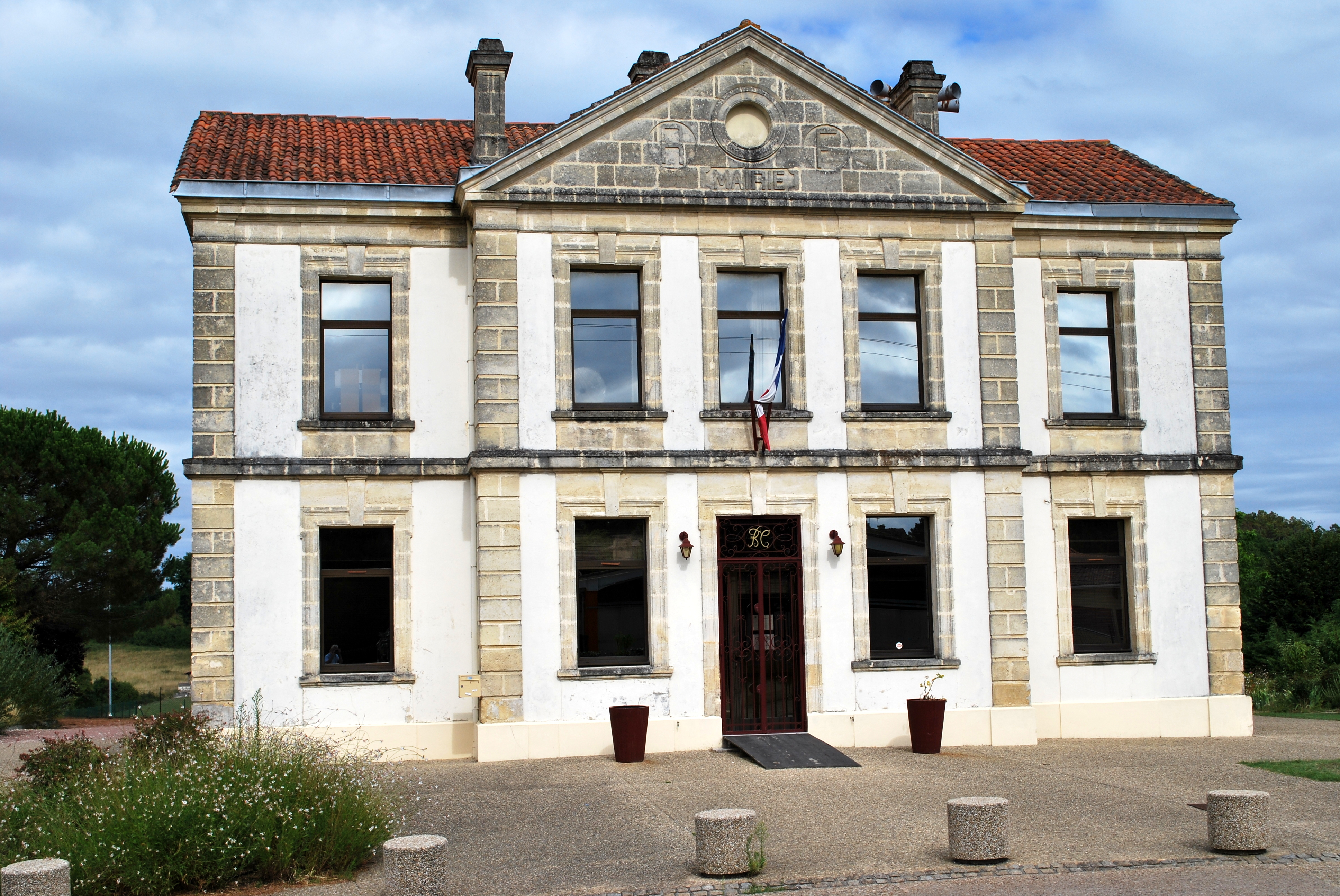 Beychac-et-Caillau Mairie